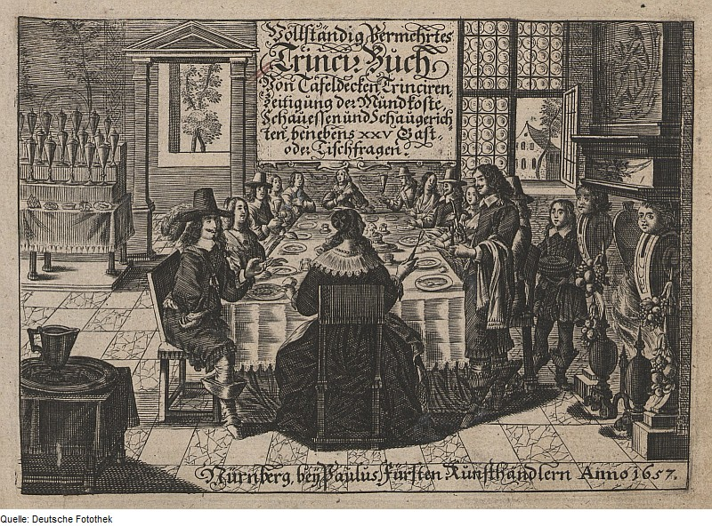 Original image description from the Deutsche FotothekGastronomie & Esskultur & Tischsitte & Speise